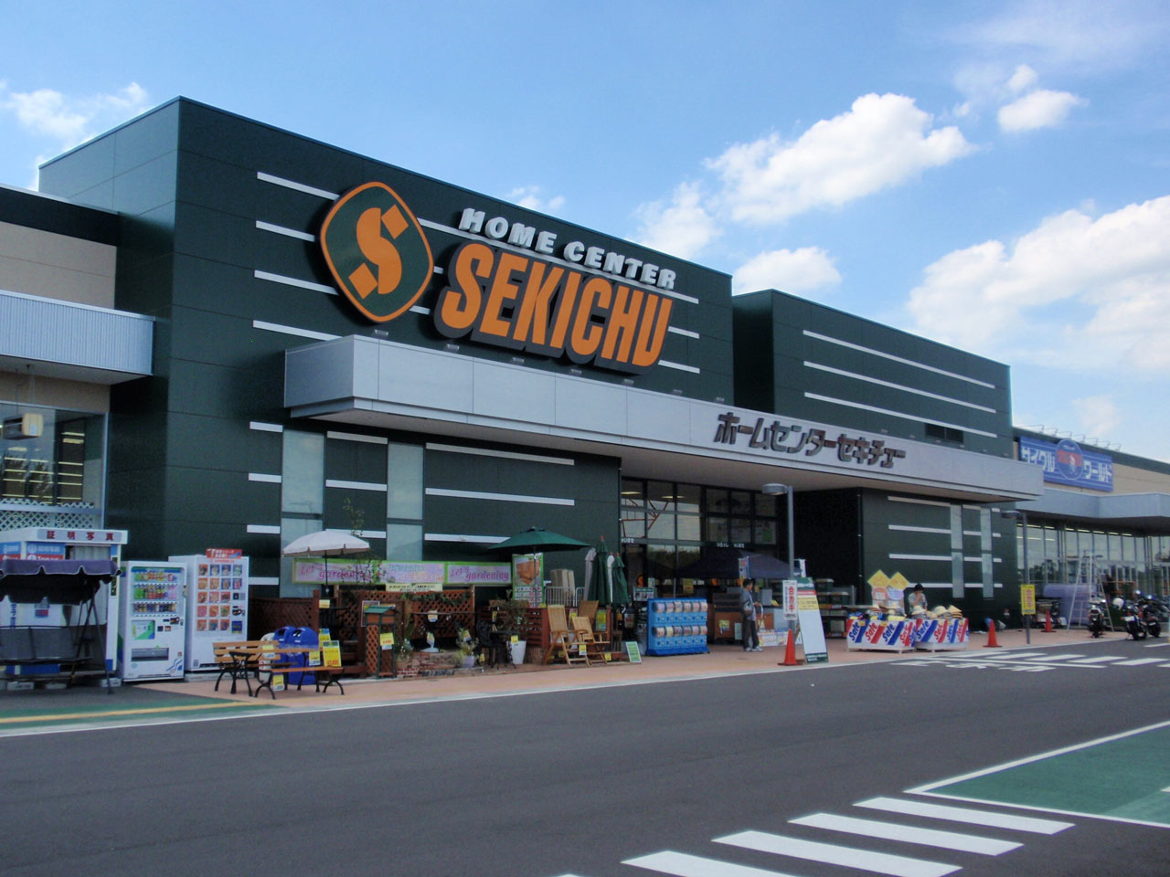 セキチュー東松山高坂店（埼玉県東松山市あずま町4-1-1）